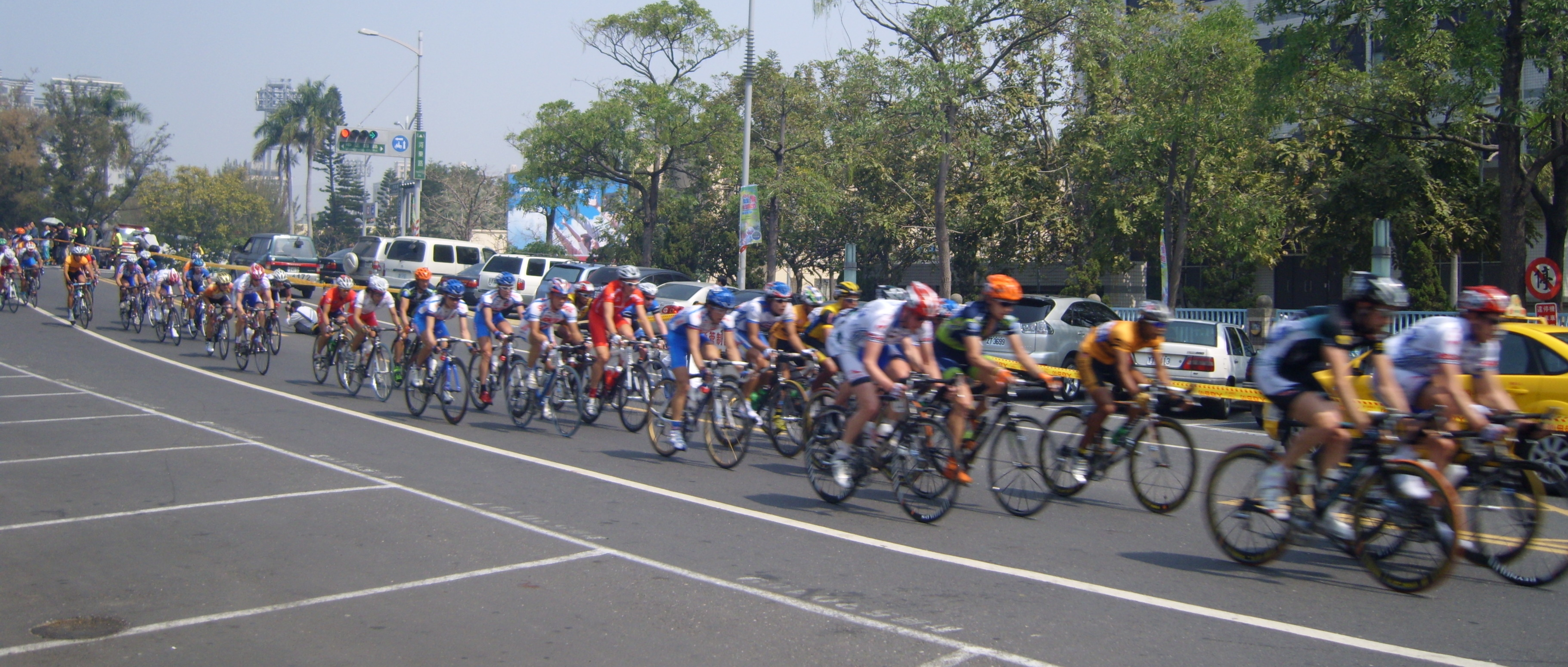 2008 Tour de Taiwan - Stage 1 in Kaohsiung.